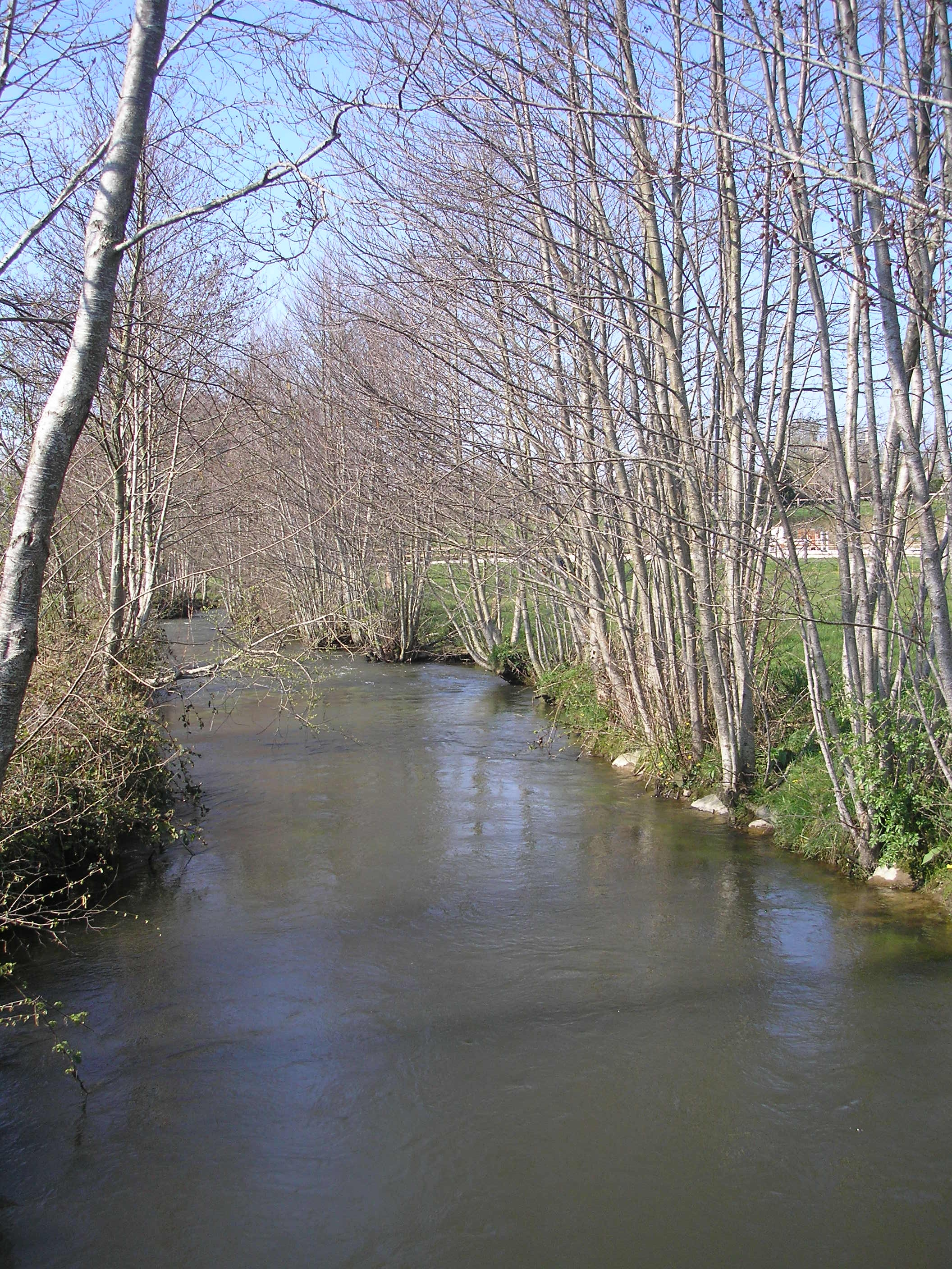 La Sée (Normandie, France) entre les communes du Mesnil-Gilbert et du Mesnil-Adelée.